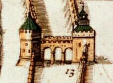 Фрагмент плана "Кремленаград" с изображением Тайницкой башни Московского Кремля.